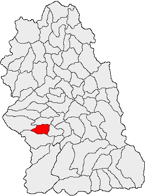 Categorie:Hărţi ale judeţului Hunedoara